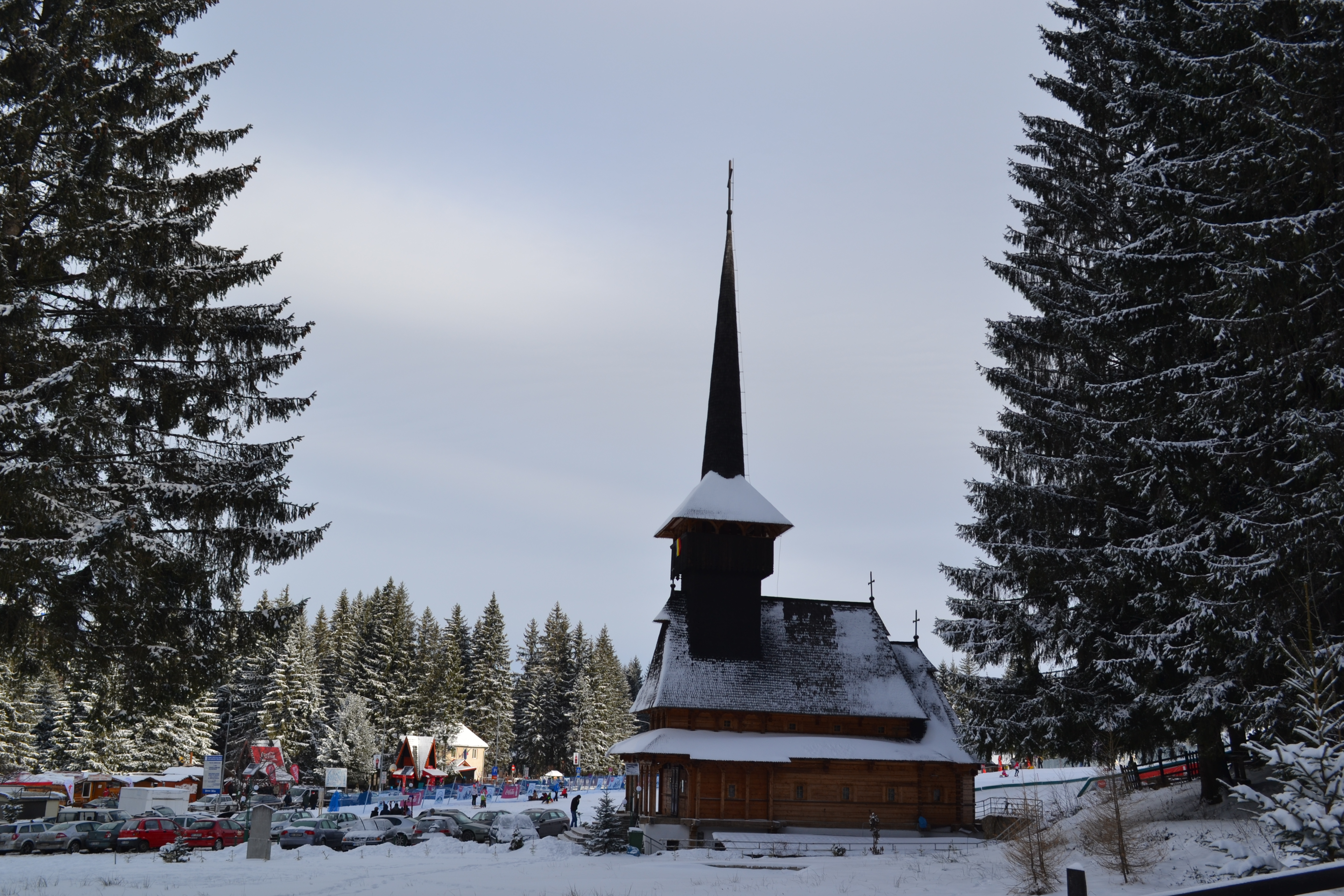 Poiana Brasov